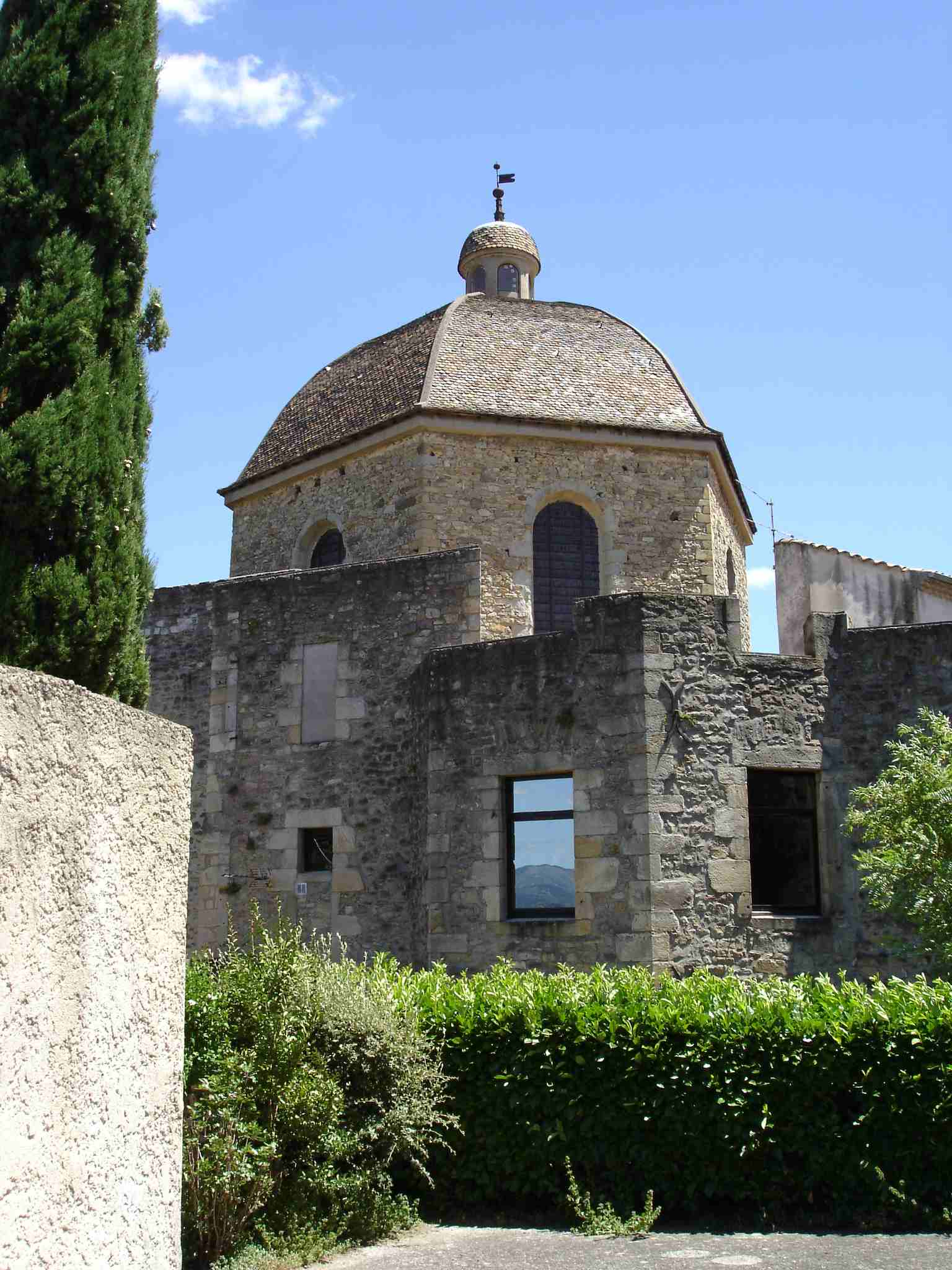 Photo perso prise durant été 2005.